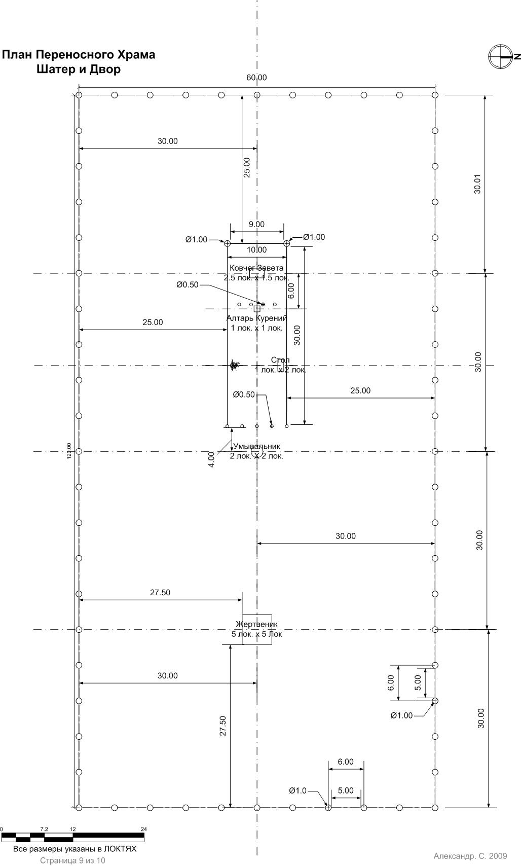 Расположение и Размеры Переносного Храма (Скиния Собрания Мишкан) согласно Пятикнижию Моисееву. -Шатер и Двор.